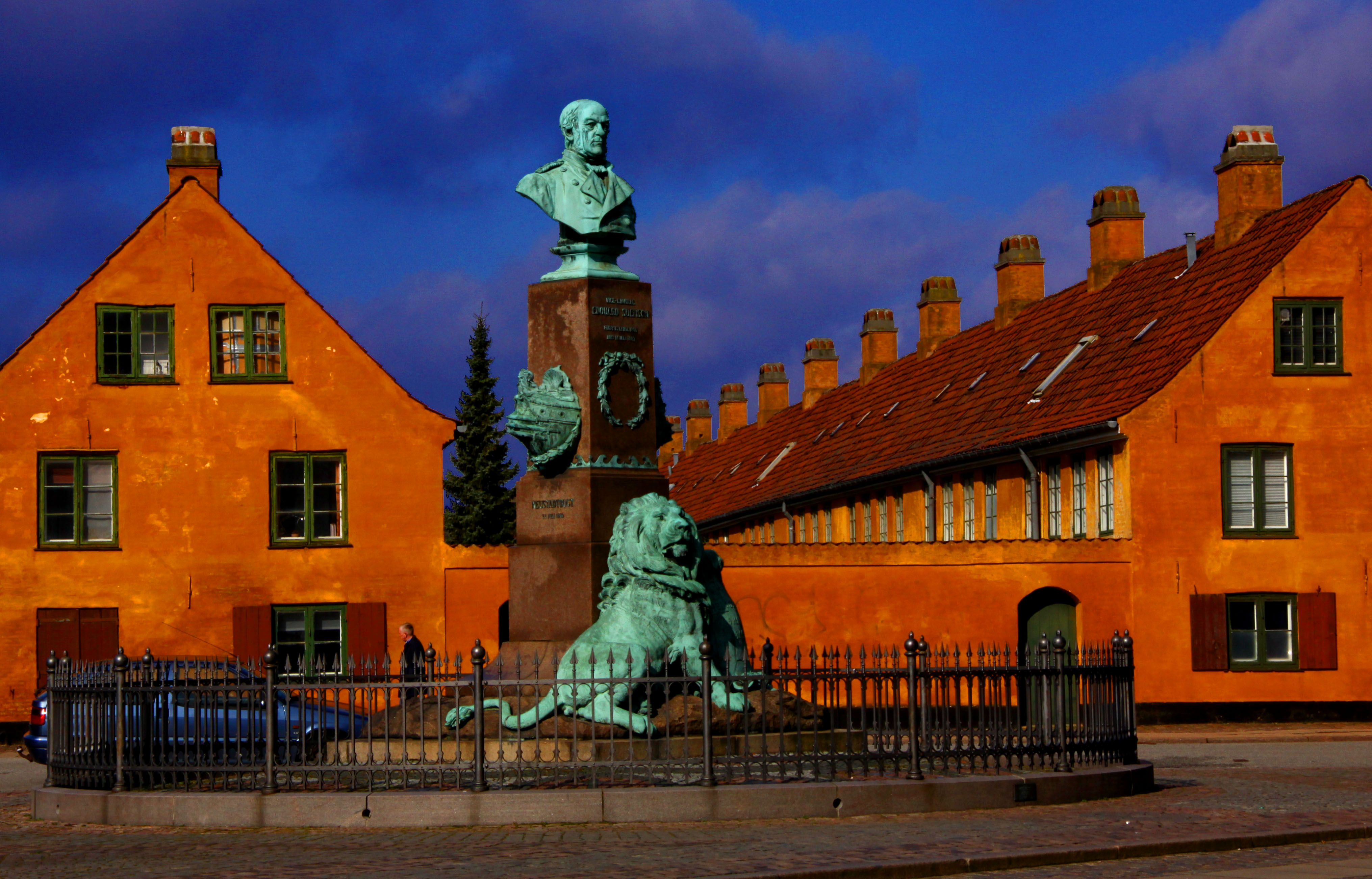 Suenson Monument at Nyboder (Store Kongensgade) in Copenhagen, Denmark